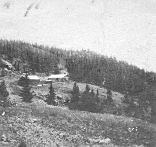 Bilde fra Søndre (Østre) Mørkedalen seter på Leirskogen. Repro John Erling Blad.